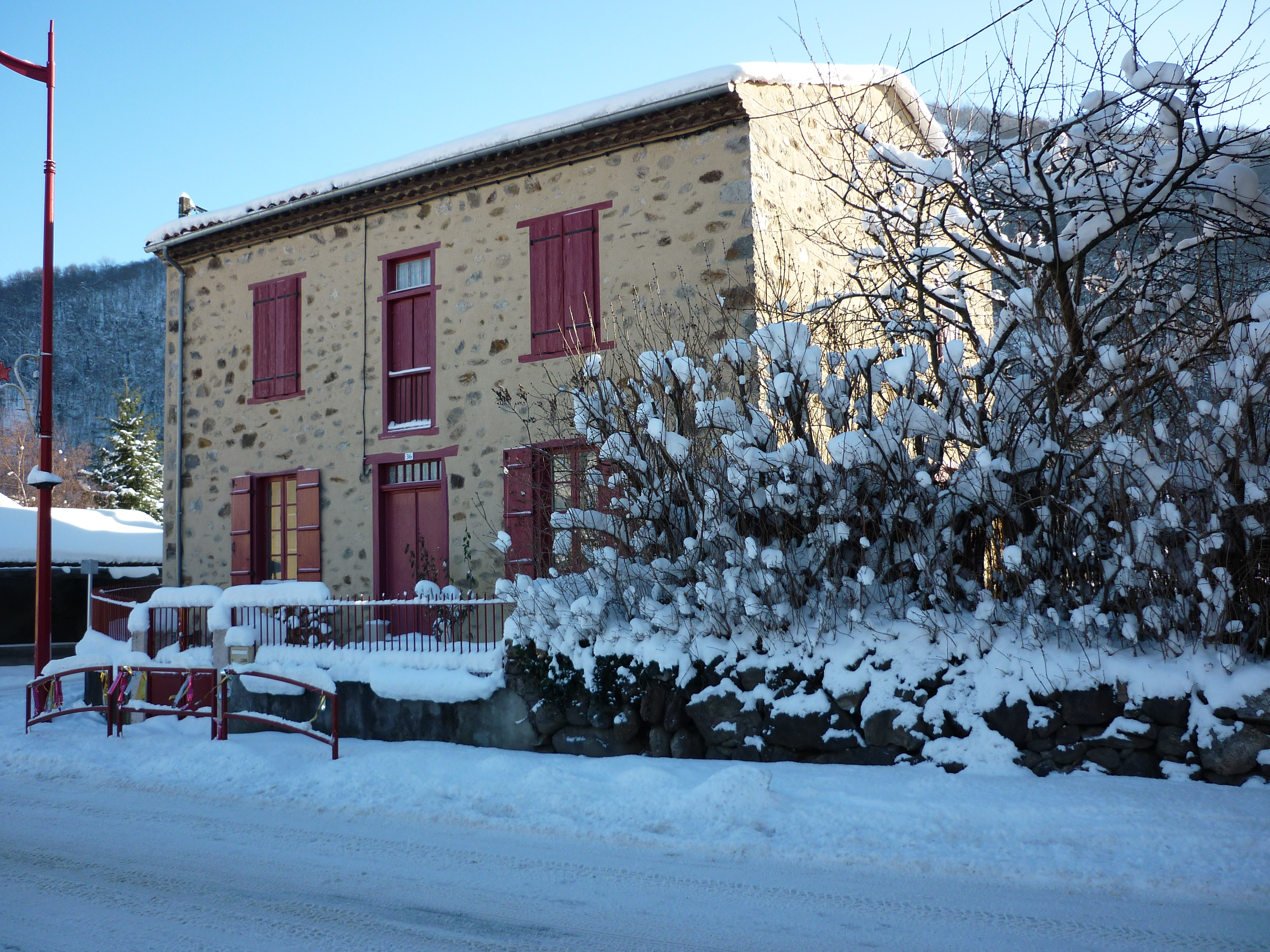 maison ariégeoise, sobriété, façade ordonnée par la symétrie, menuiseries rouge lit de vin, murs pierre et chaux